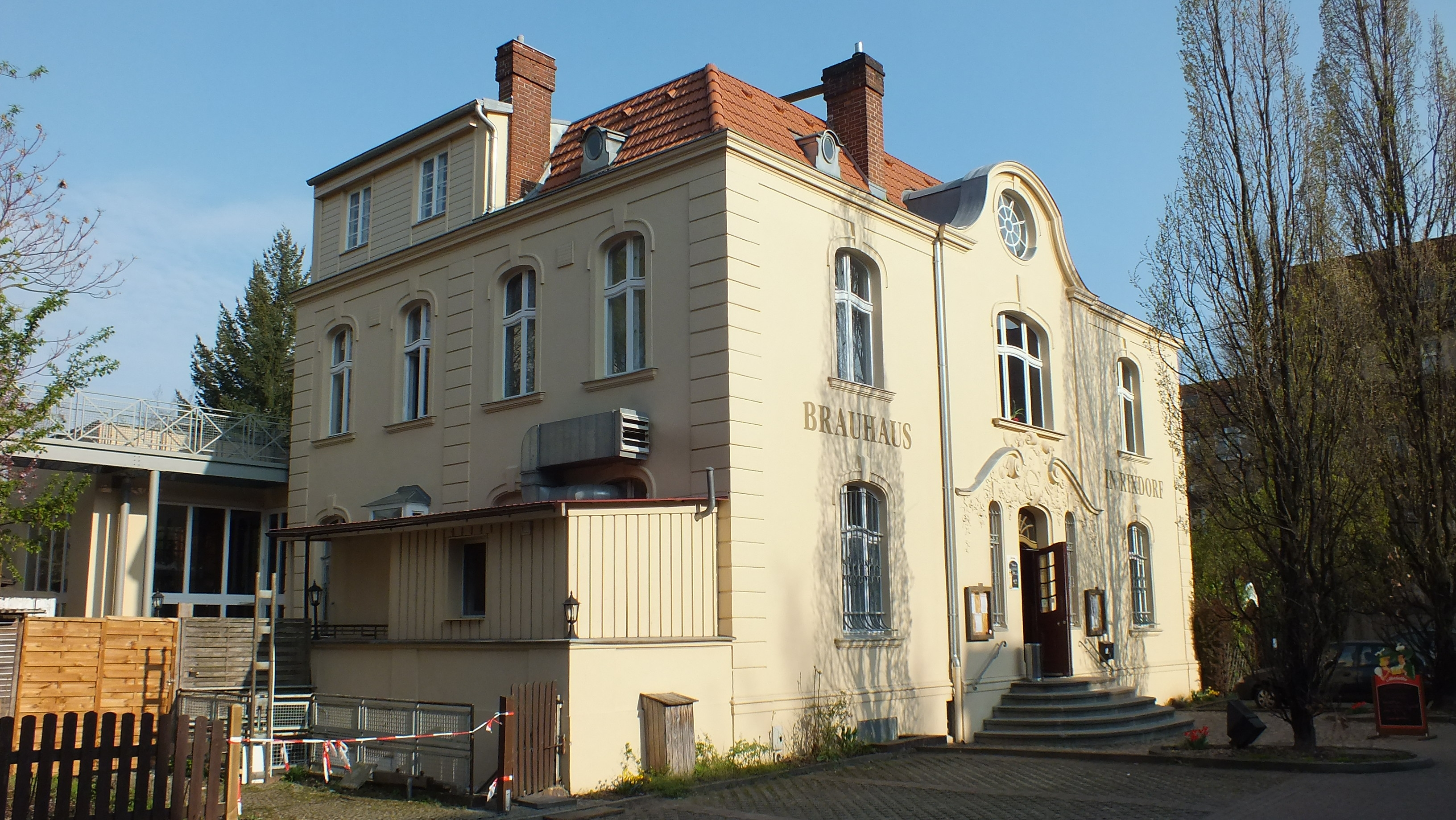 Das Gelände des ehemaligen Eisenwerk Franz Weeren befindet sich in Berlin-Neukölln in der Glasower Straße 27 – 28. Die dazugehörige Fabrikantenvilla befindet sich in der Delbrückstraße 39. Beide stehen seit 1985 unter Denkmalschutz. In der ehemaligen Villa befindet sich derzeit das Brauhaus RixdorfThis is a photograph of an architectural monument.